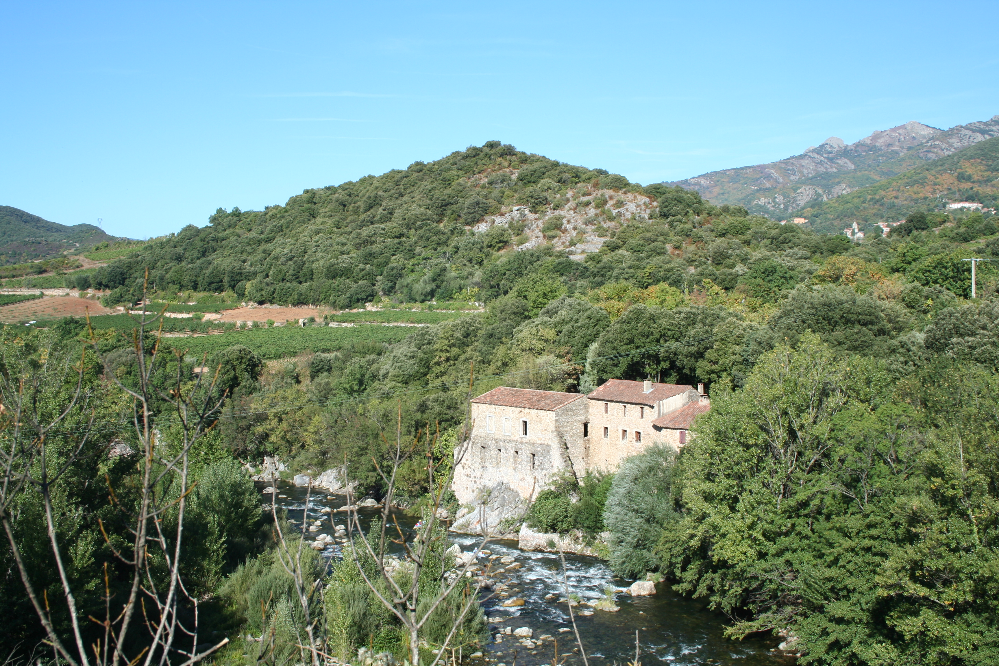 Mons (Hérault) - Moulin de Prades sur l'Orb.